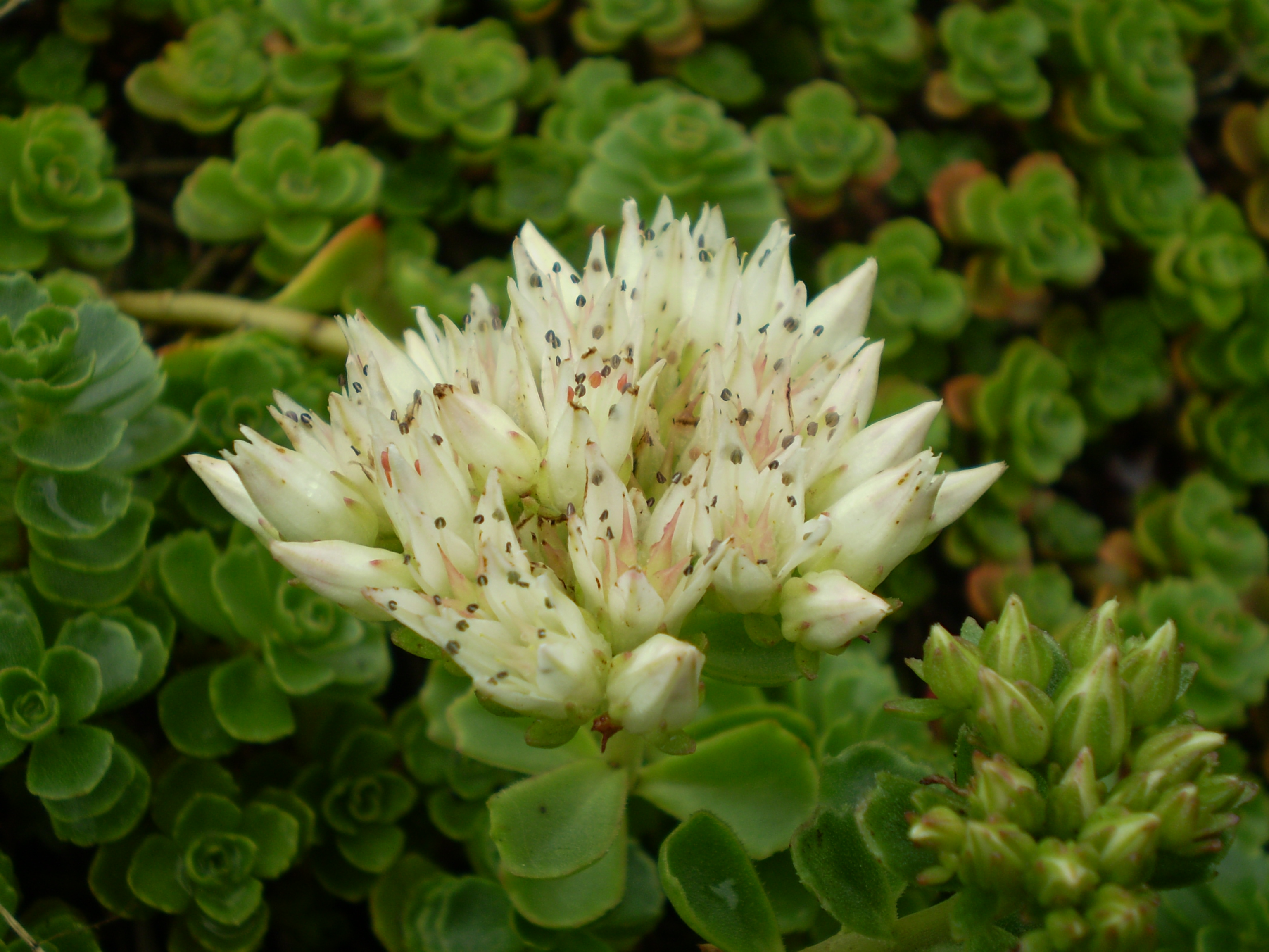 Sedum spurium album superbum . vetkruid .